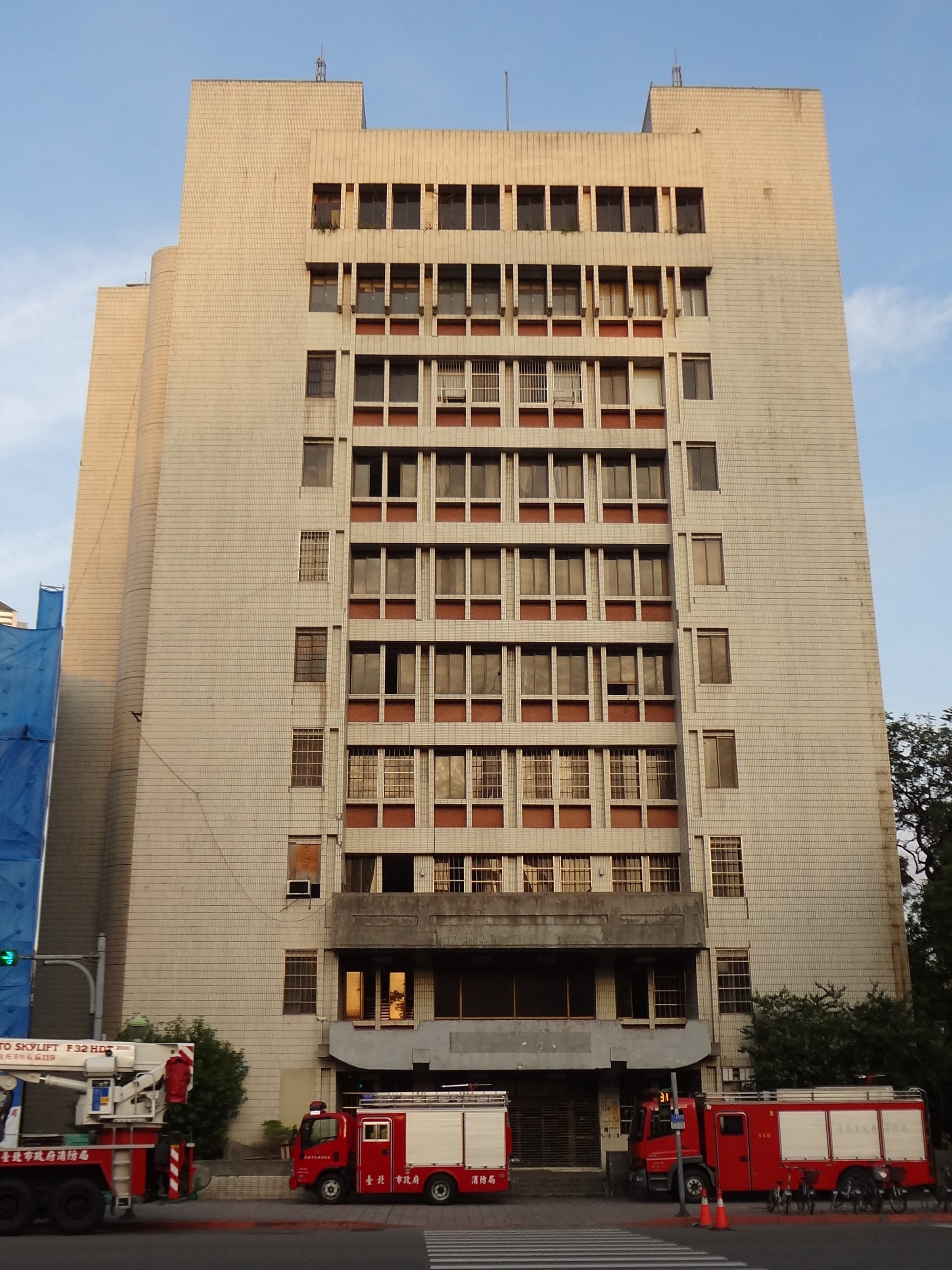 建成大樓，位於臺北市大同區承德路二段33號，2012年4月18日臺北市政府核定為高氯離子混凝土建築物（海砂屋）。